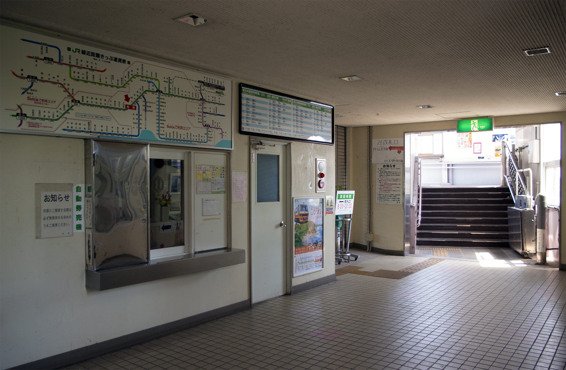 東日本旅客鉄道株式会社東北本線船岡駅